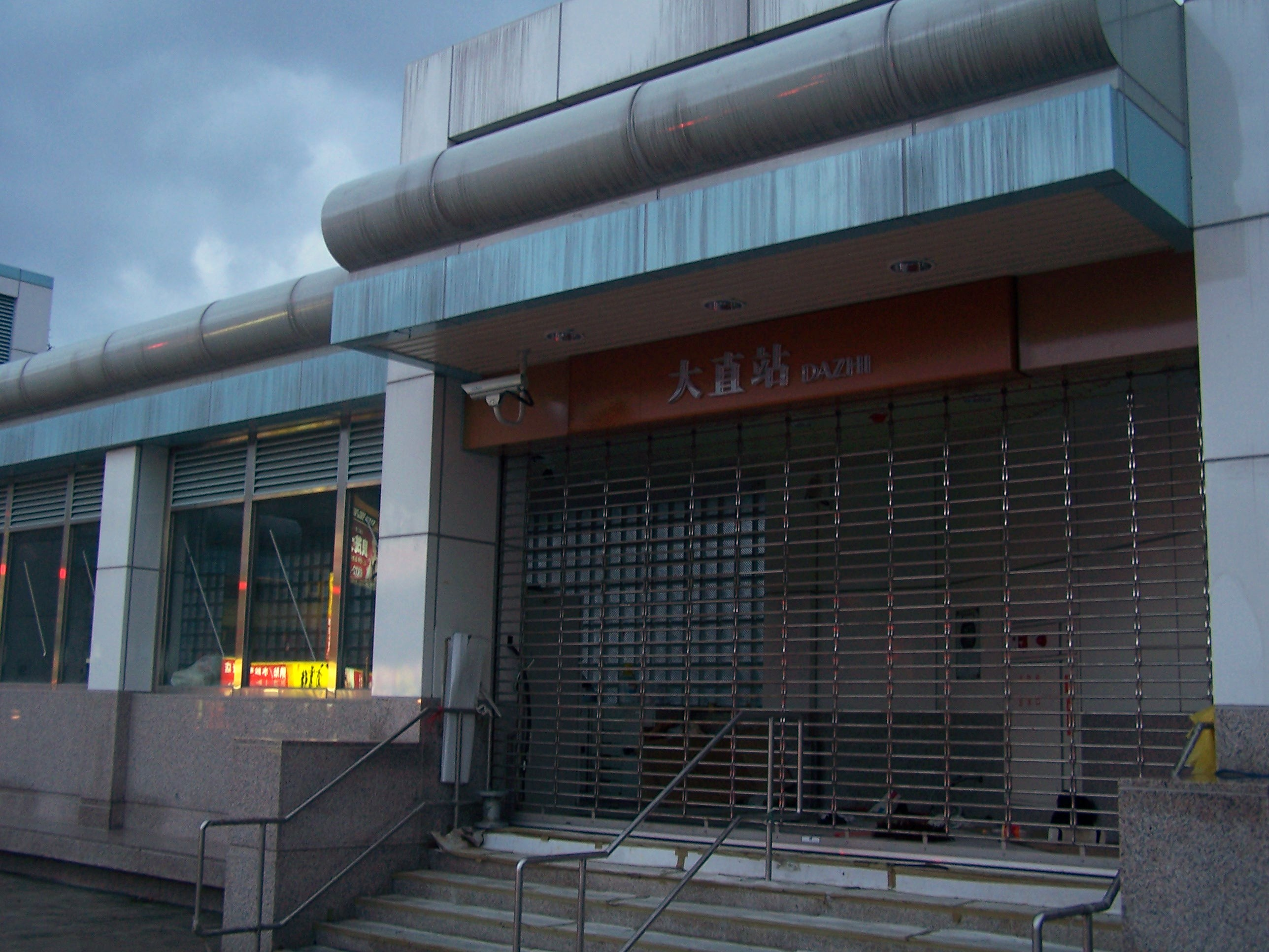 開業前的臺北捷運內湖線大直站。